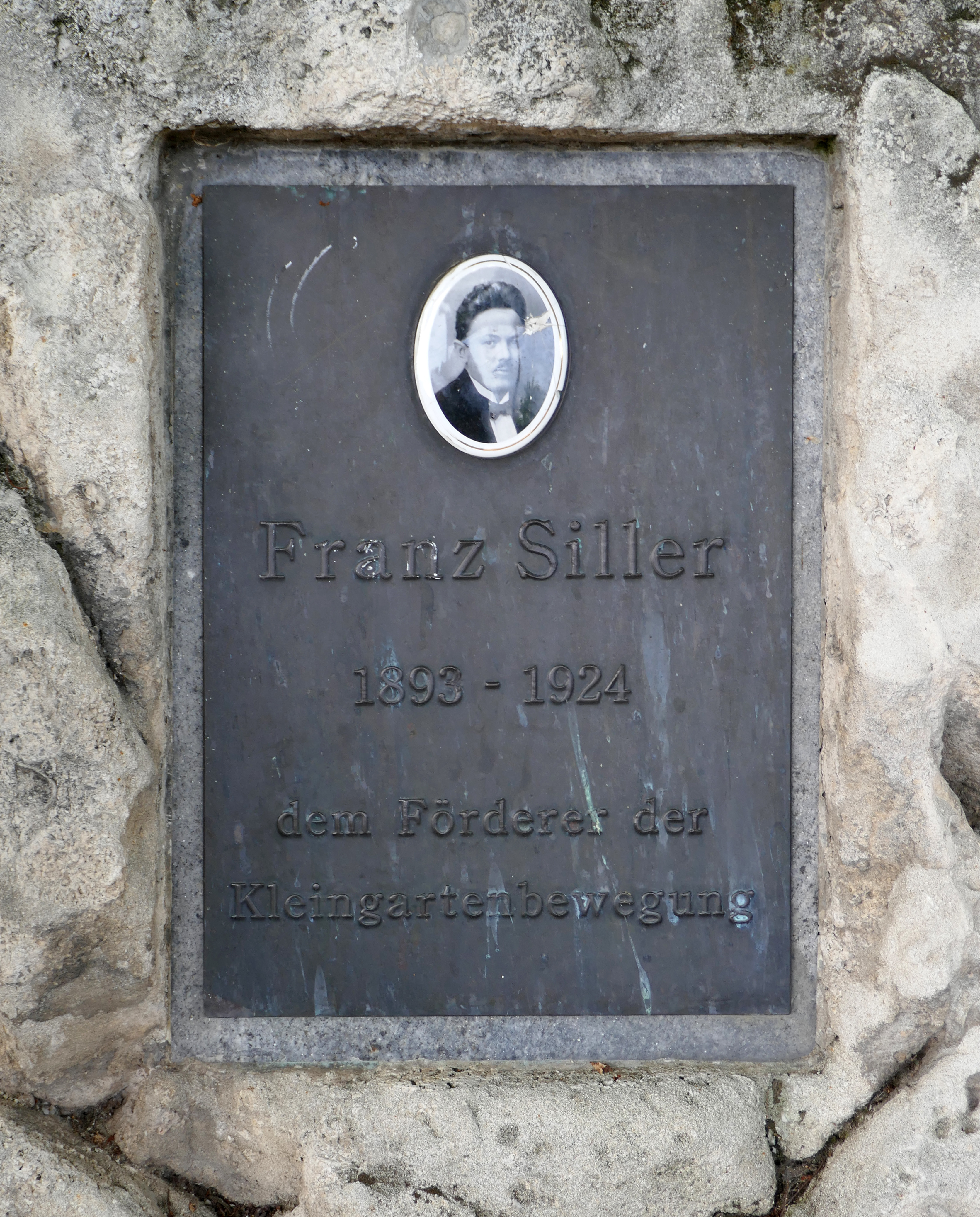 Schutzhaus zur Zukunft auf der Schmelz, Wien. Tafel für Franz Siller.